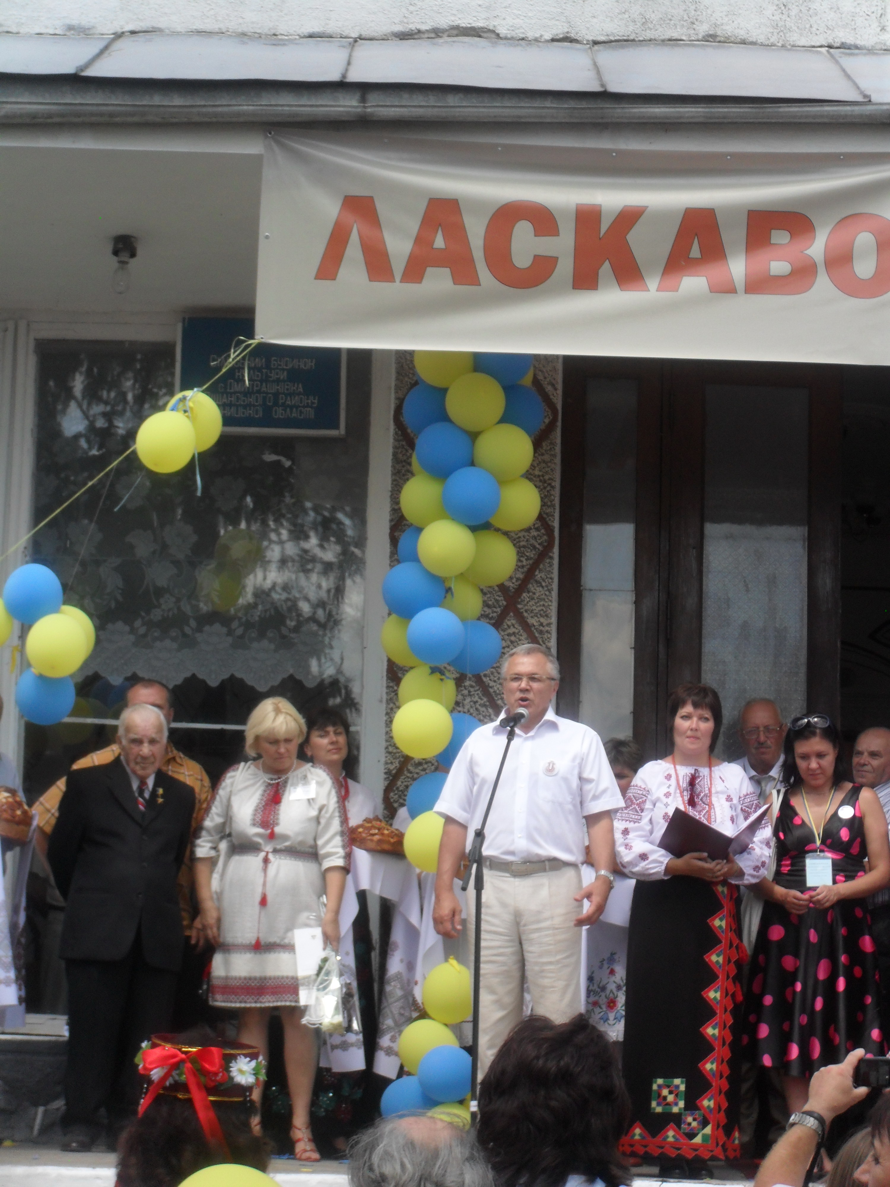 Третій міжнародний фестиваль імені Павла Муравського. Під час церемонії відкриття. Слово має Голова Вінницької обласної ради С.П. Татусяк